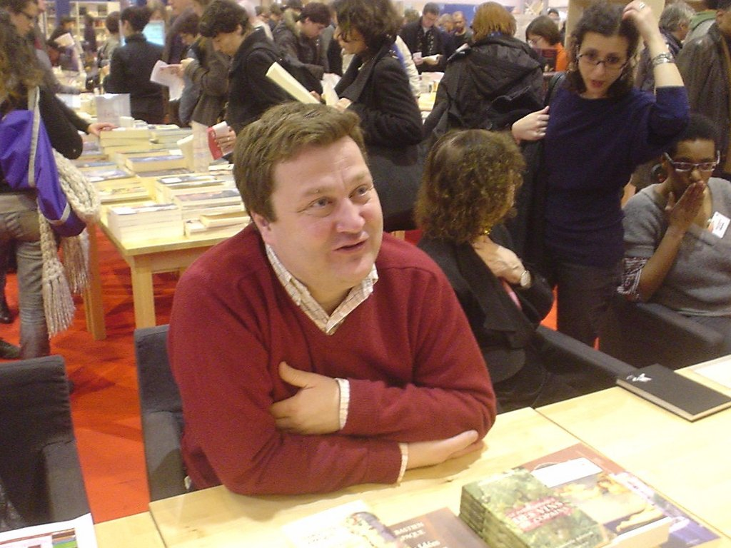 Sébastien Lapaque au Salon du Livre à Paris en 2010.